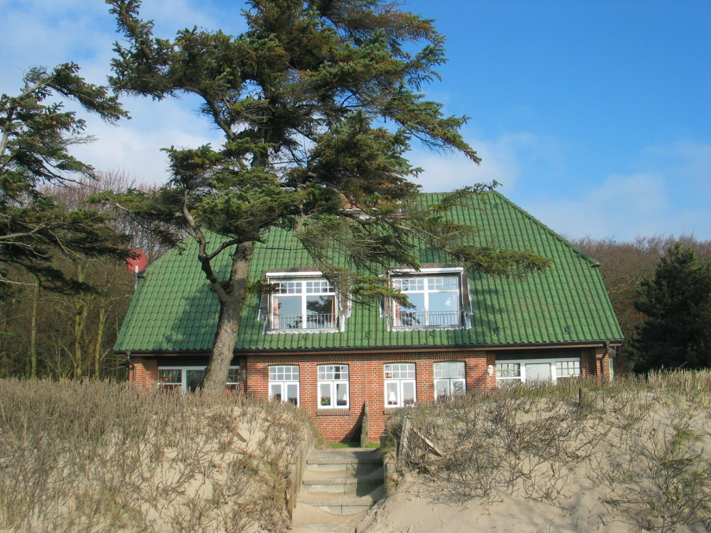 Haus am Südstrand, Wyk auf Föhr